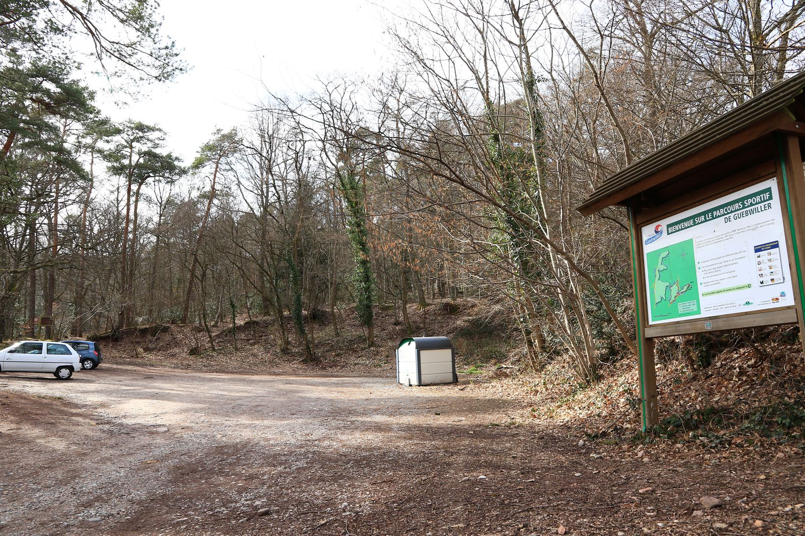 Parking du Sandgrube. Rue du Sudel, a Guebwiller. Point de départ vers "Le Saulager" (clairière multi-centenaire, bordé de très vieux chênes)